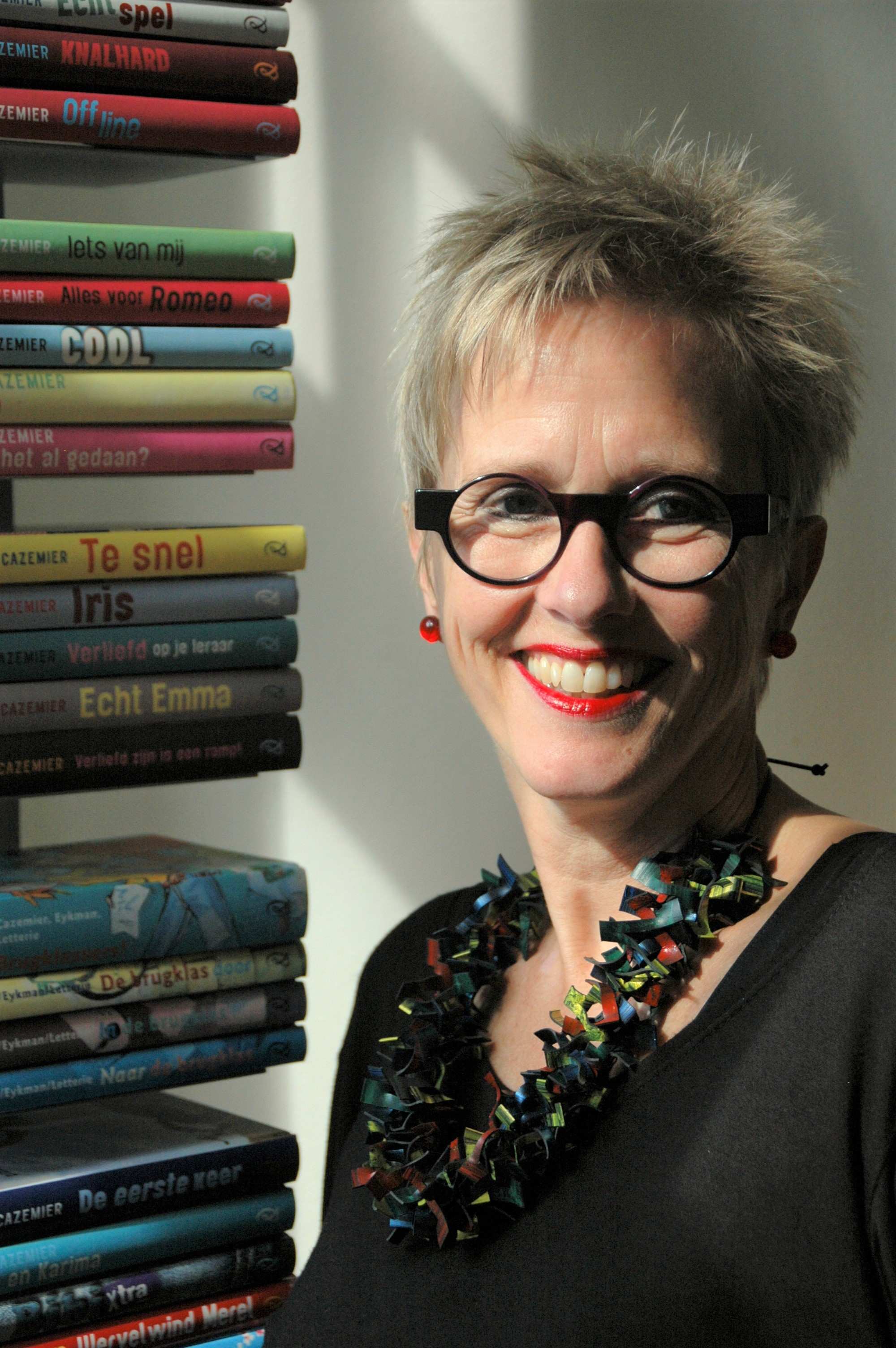 Foto van jeugdboekenschrijfster Caja Cazemier bij een aantal door haar geschreven boeken.